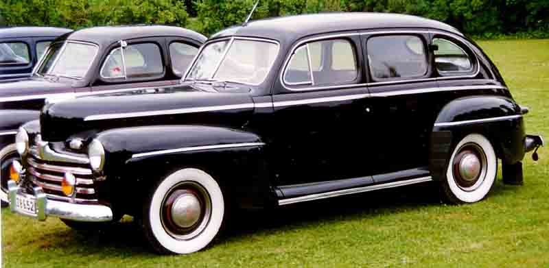 Ford Model 69A 73B Super De Luxe Fordor Sedan 1946